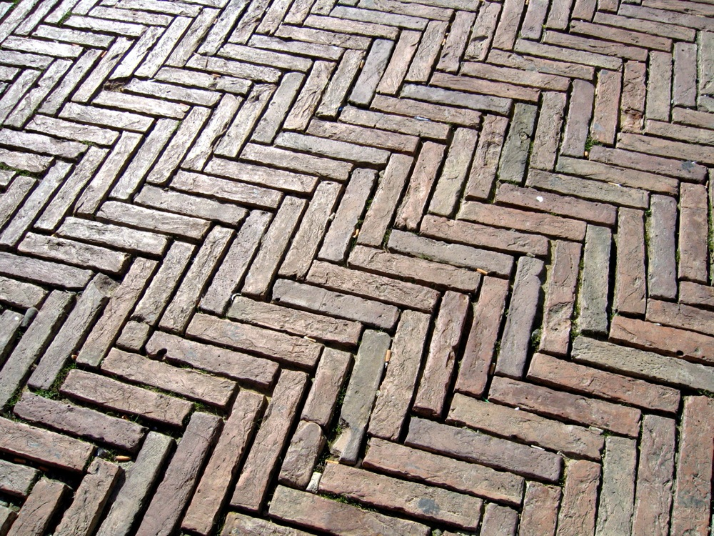 Herringbone bond pavement, Piazza del Campo, Siena, Italia